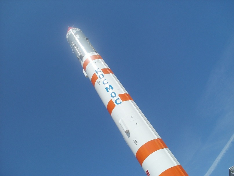 Макет ракеты перед зданием СибГАУ в Красноярске